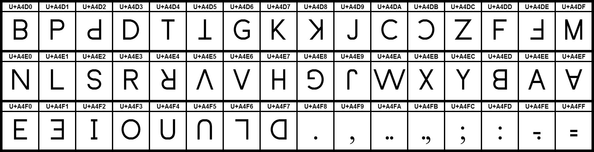 Grafiktafel für den Unicodeblock Lisu.